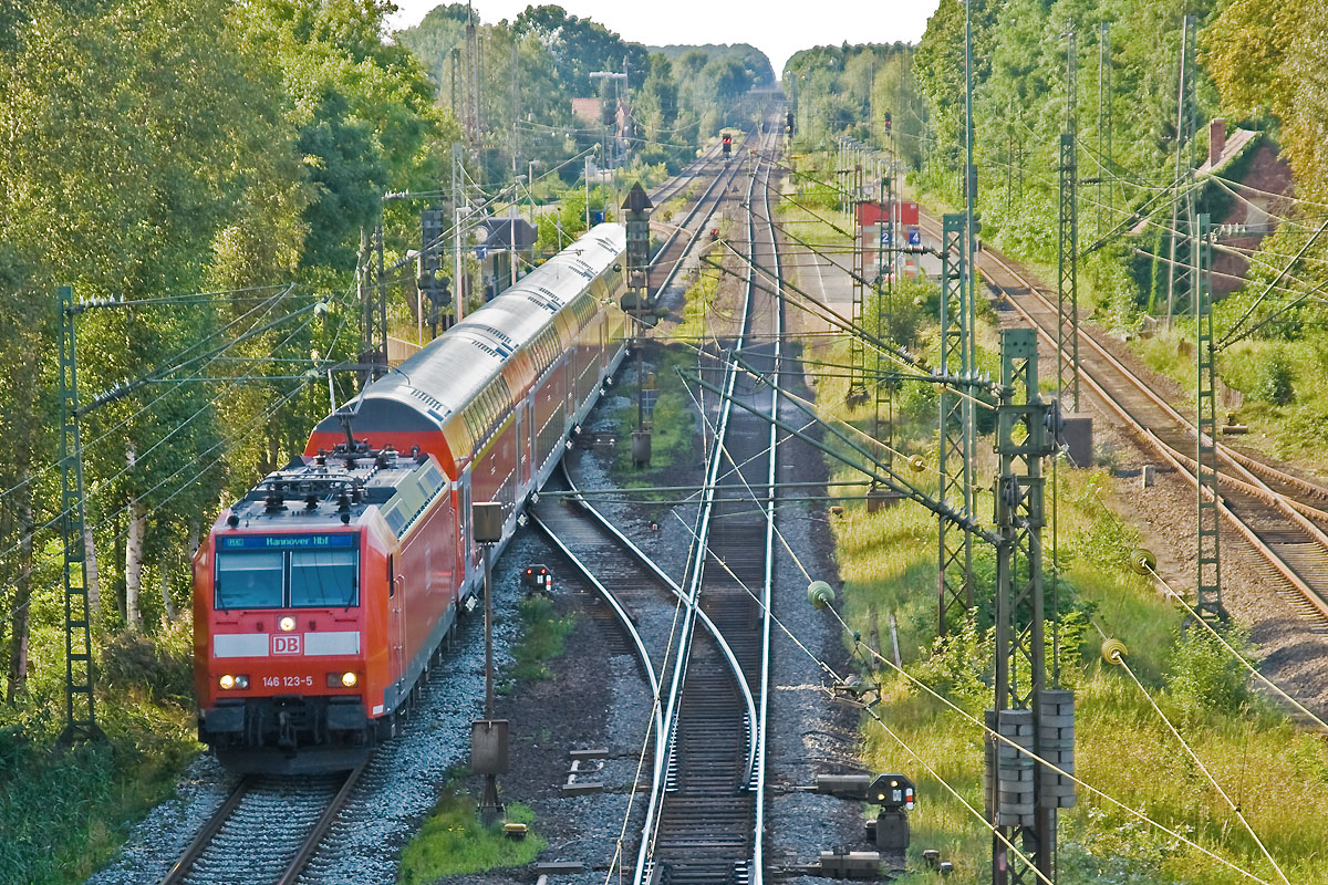 Bahnhof Langwedel: Durchfahrt des Regionalexpress (RE) 14067 Norddeich Mole–Hannover auf Gleis 1. Die aus Doppelstockwagen zusammengestellten Wendezüge werden mit Lokomotiven der DB AG-Baureihe 146 (146 123) bespannt, die im Betriebshof Braunschweig beheimatet sind.